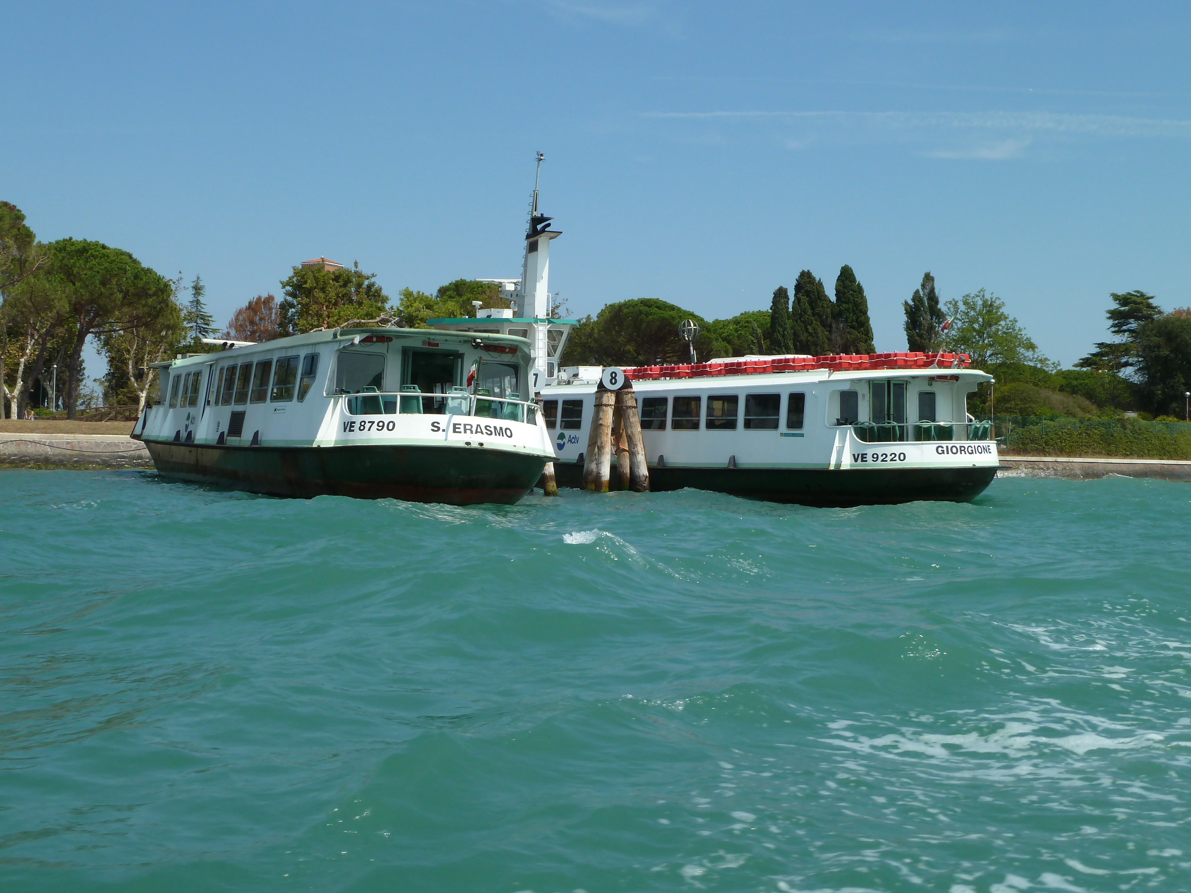 Vaporetti s erasmo and giorgione